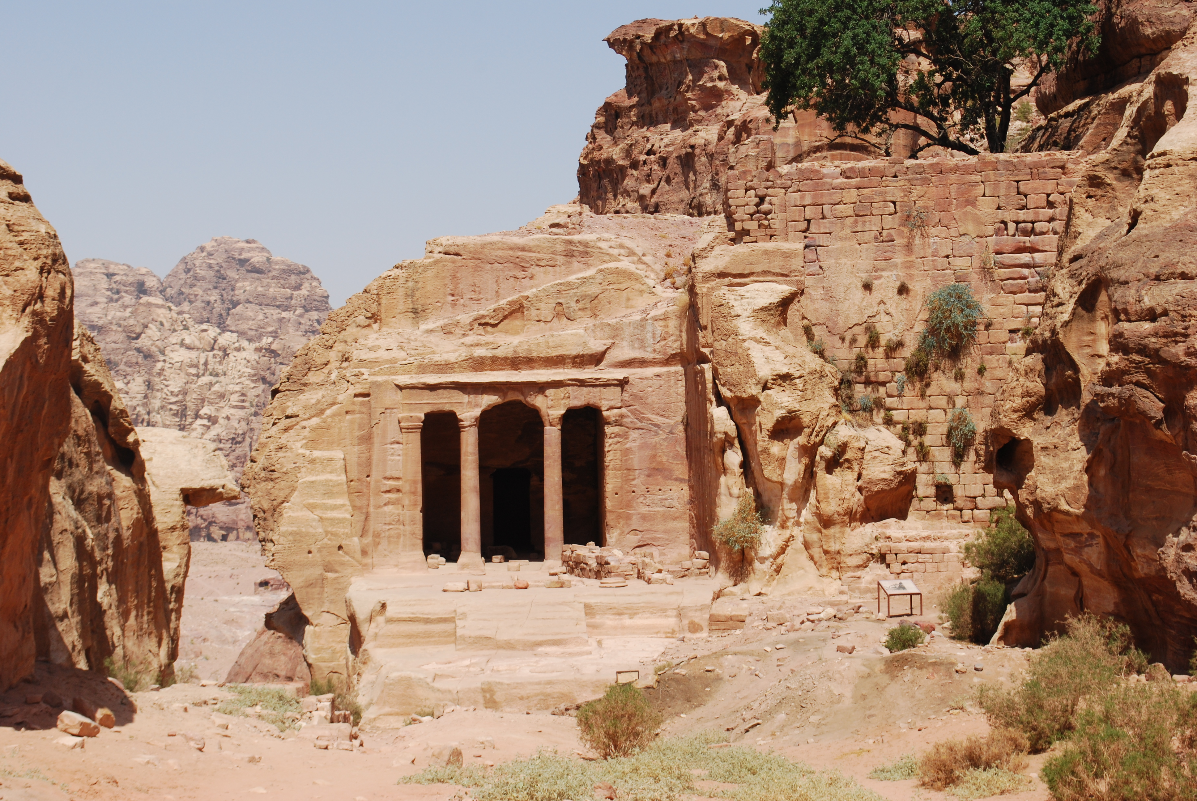 Le Temple du Jardin dans le Wadi al-Farasa à Pétra.